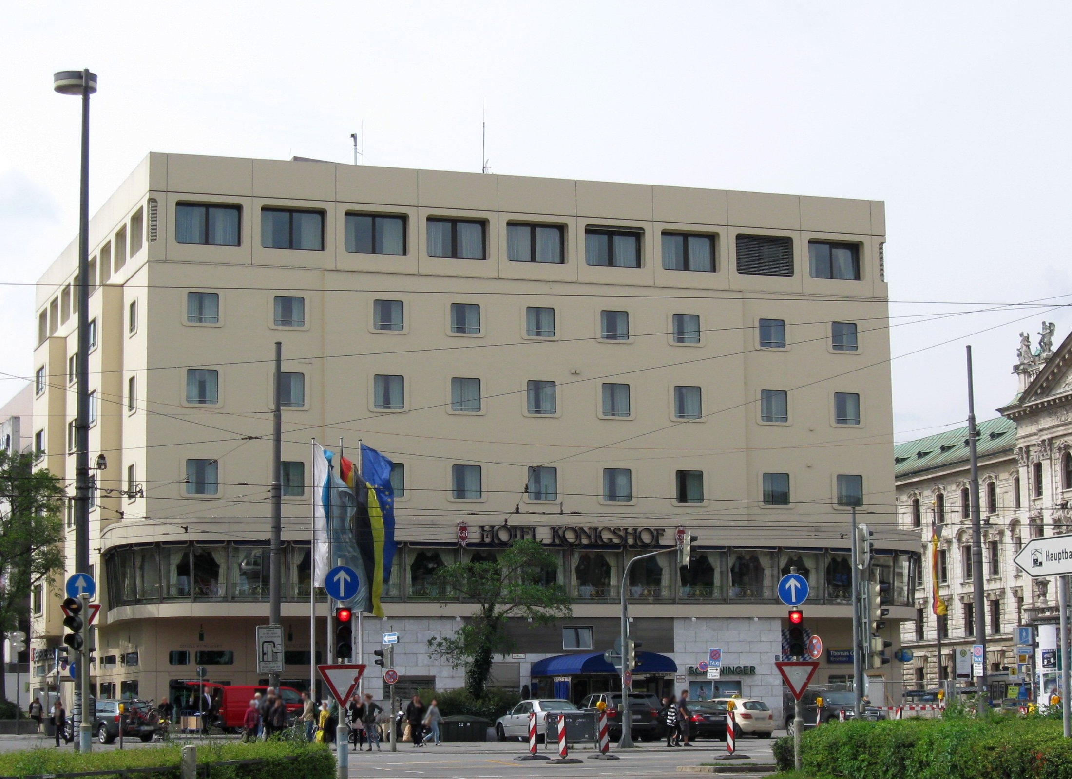 Hotel Königshof, München, Karlsplatz 25